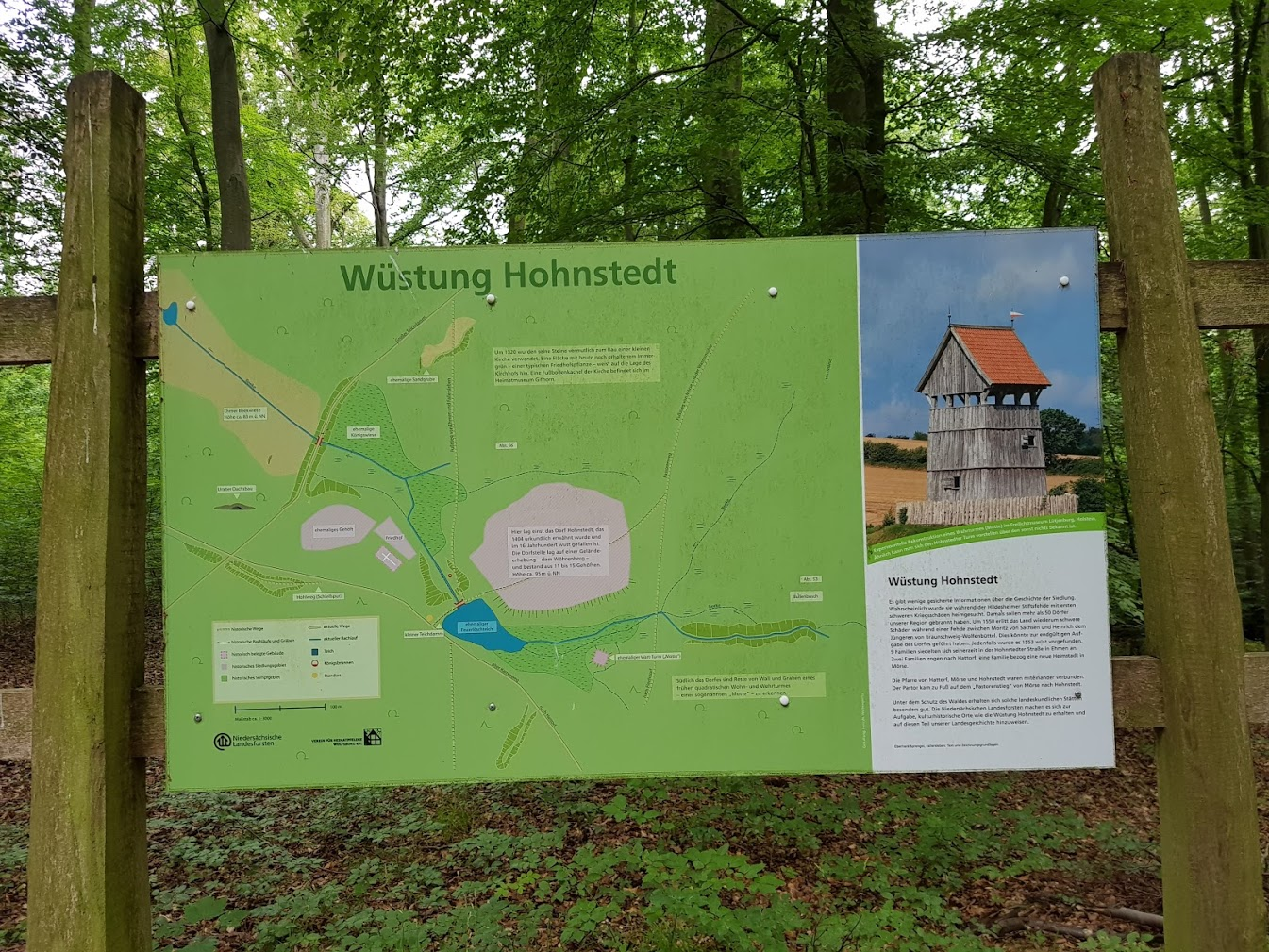 Erläuterungstafel zur Wüstung Hohnstedt